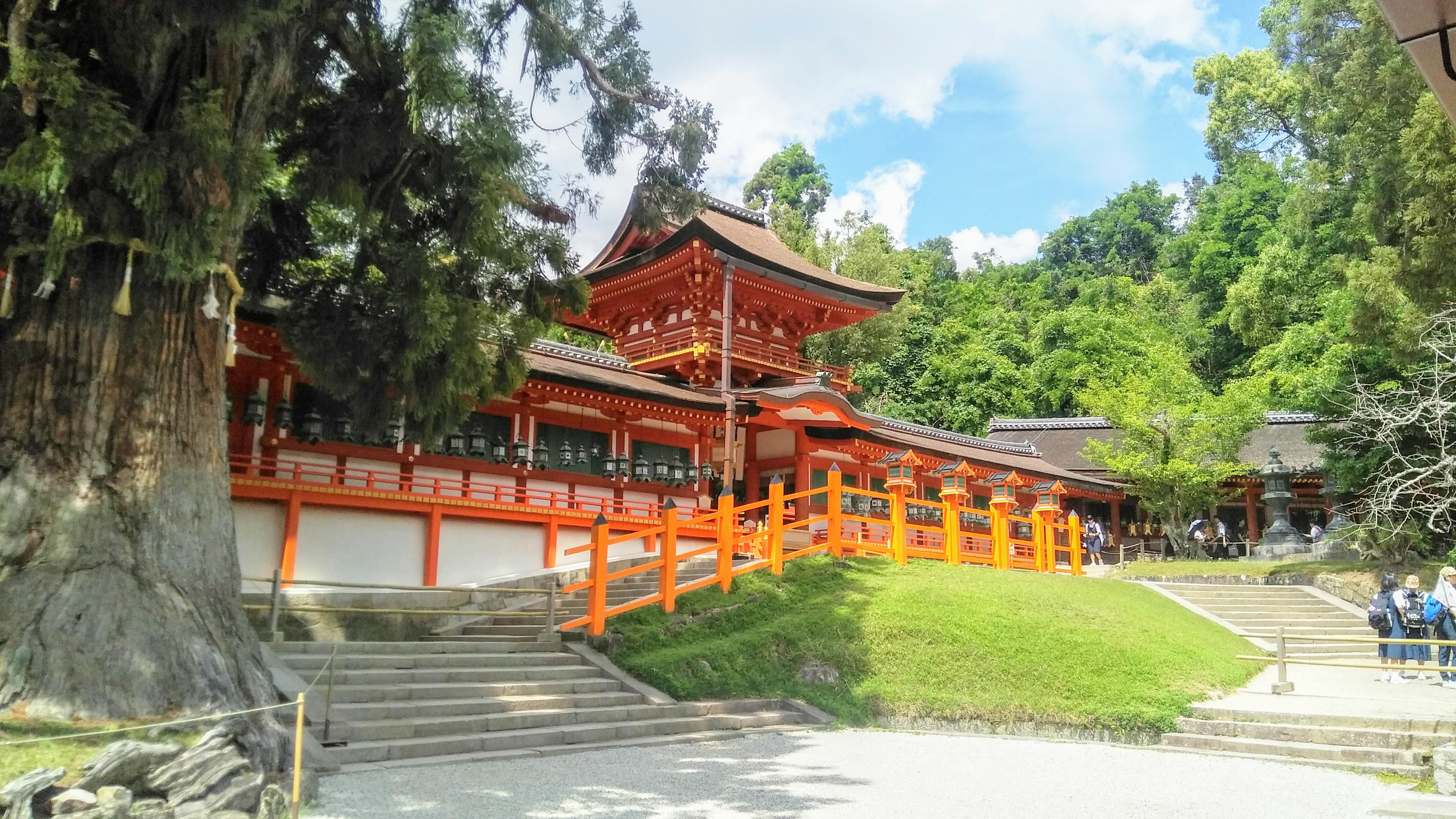 客家語/Hak-kâ-ngî: Chhûn-ngit Thai-sa